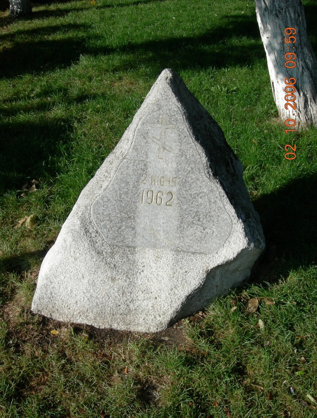 Новочеркасск. Камень-на-Крови, установленный на месте трагедии 1962 года в сквере Платова, перед Дворцовой площадью.